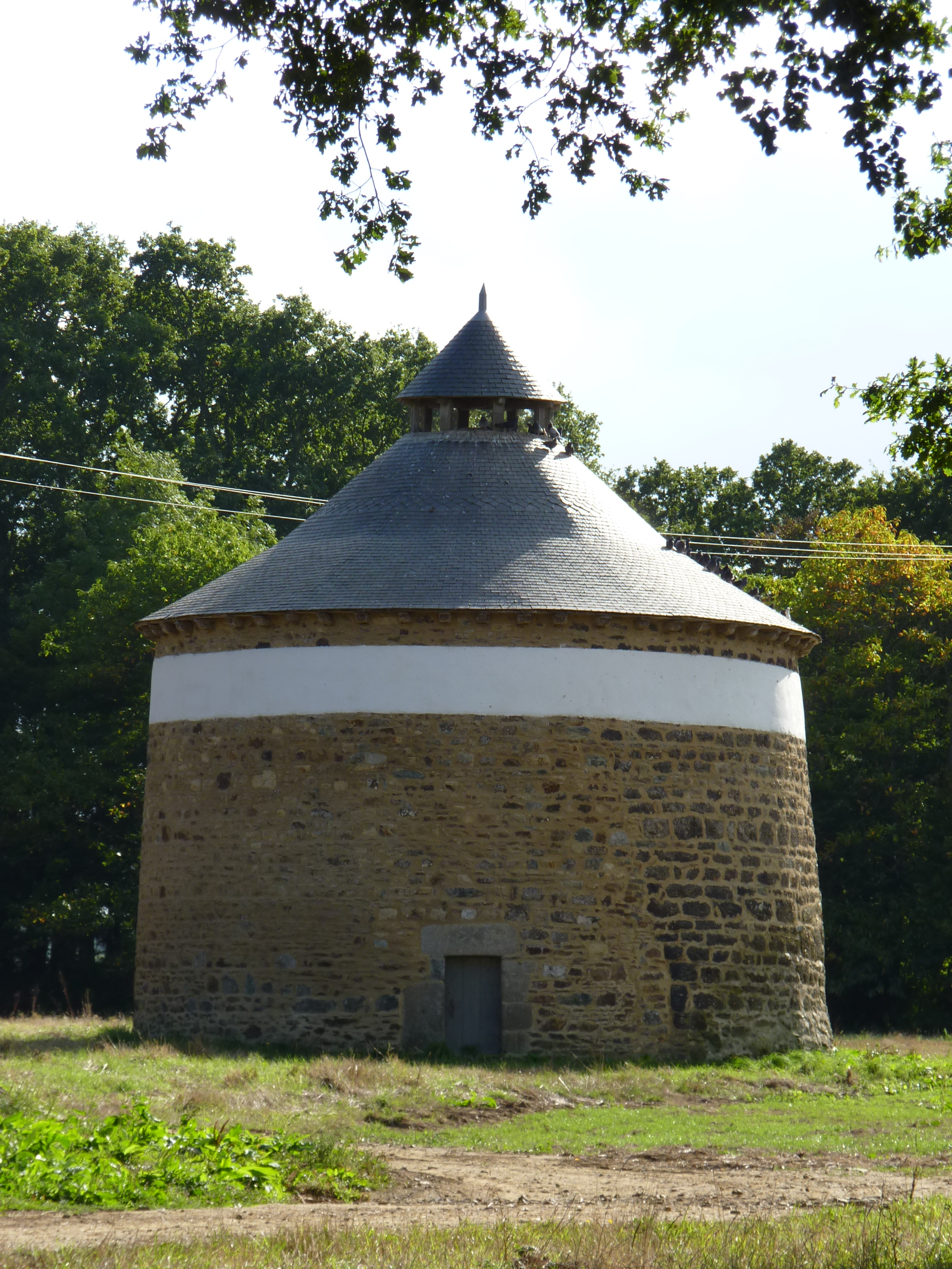 Château du 17ème siècle. Pigeonnier.